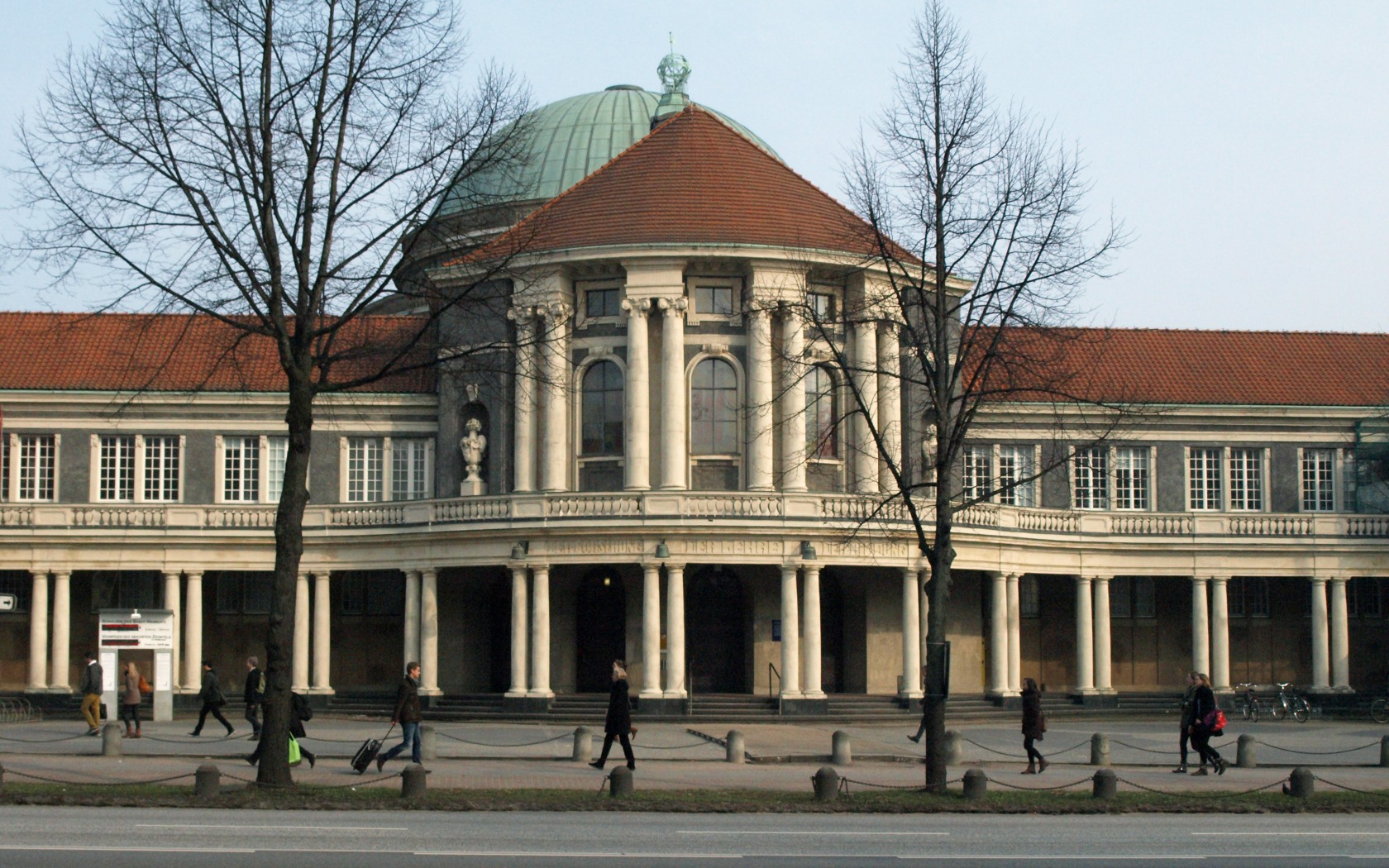 Hamburg, Universität Hauptgebäude, Foto 2014